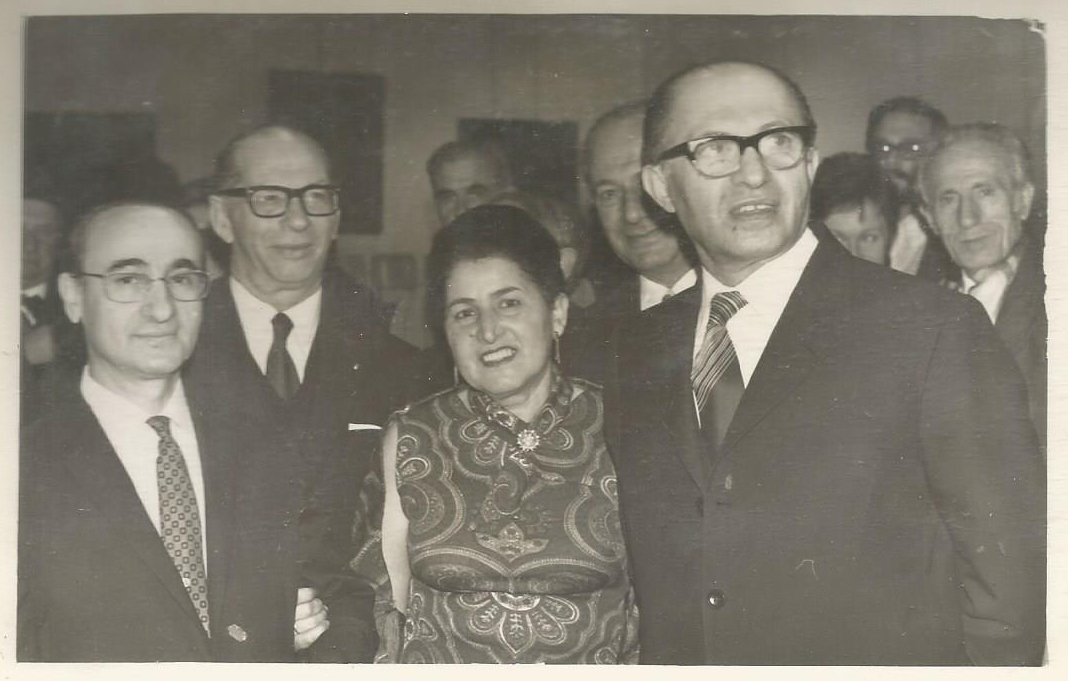 הצייר בעבודתו ברמת גן, ישראל